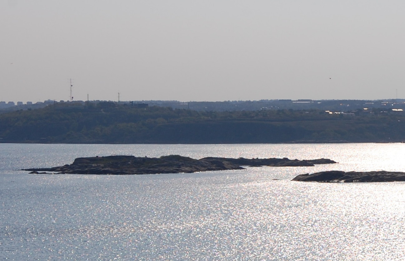 Insel im Schärengarten vor Göteborg